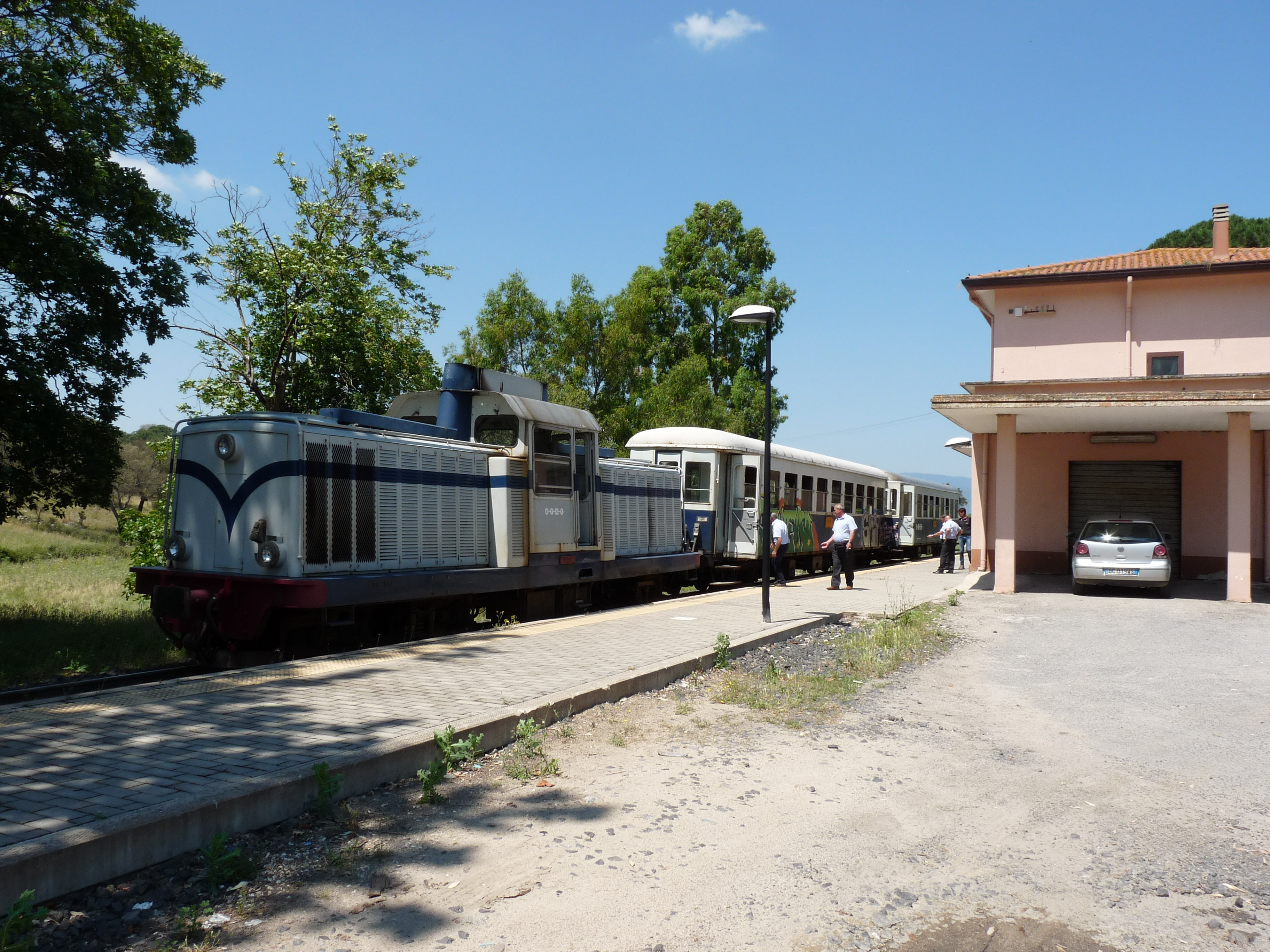 Een excursietrein tussen Macomer en Nuoro